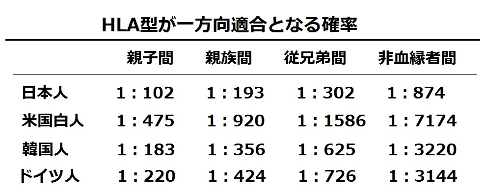 輸血において供血者と受血者でHLA型が一方向適合になる国別確率